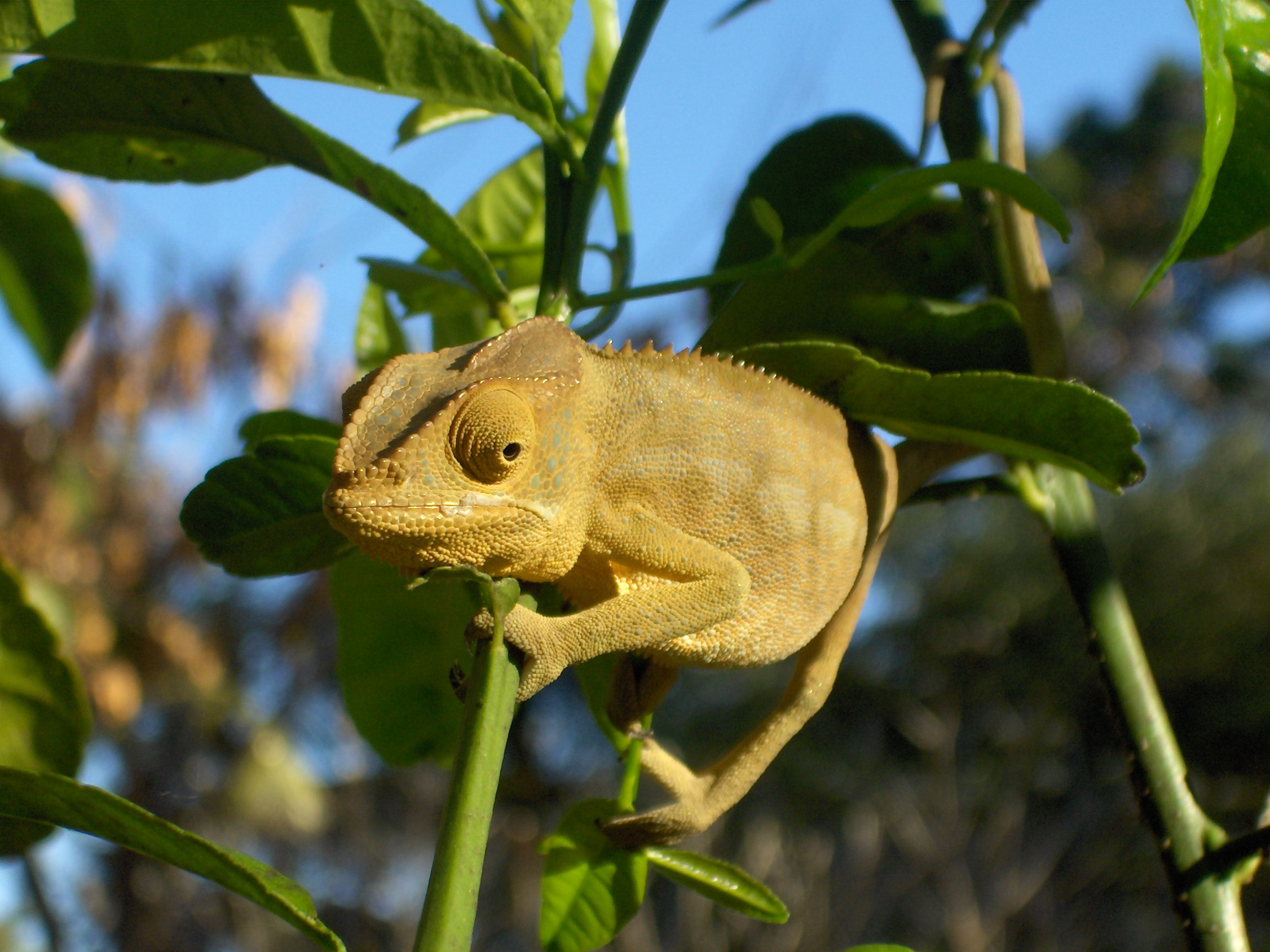 Camaleonte del Madagascar, fotografato sull'Isola di Nosy-Be